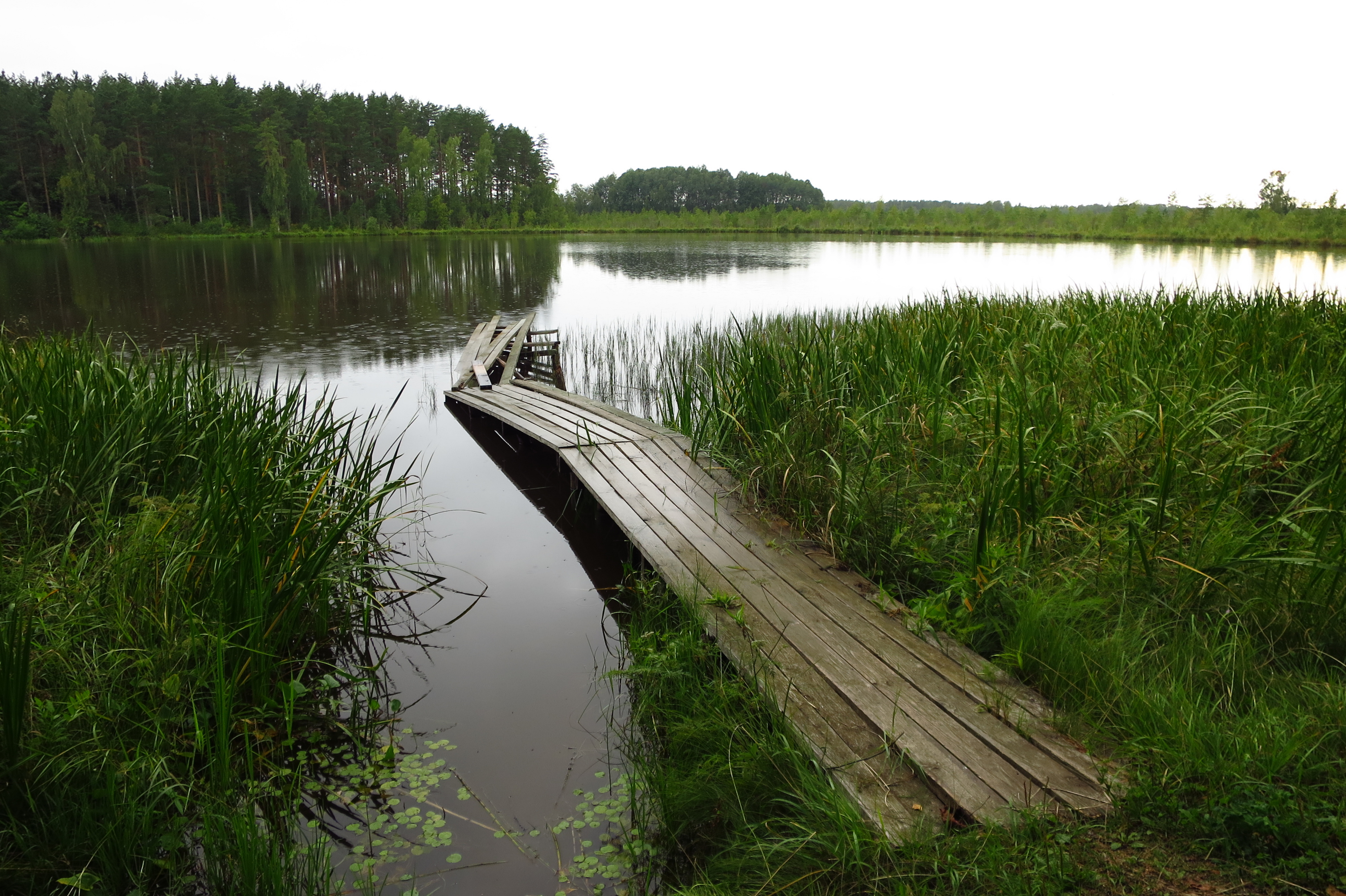 Saarõpää järv